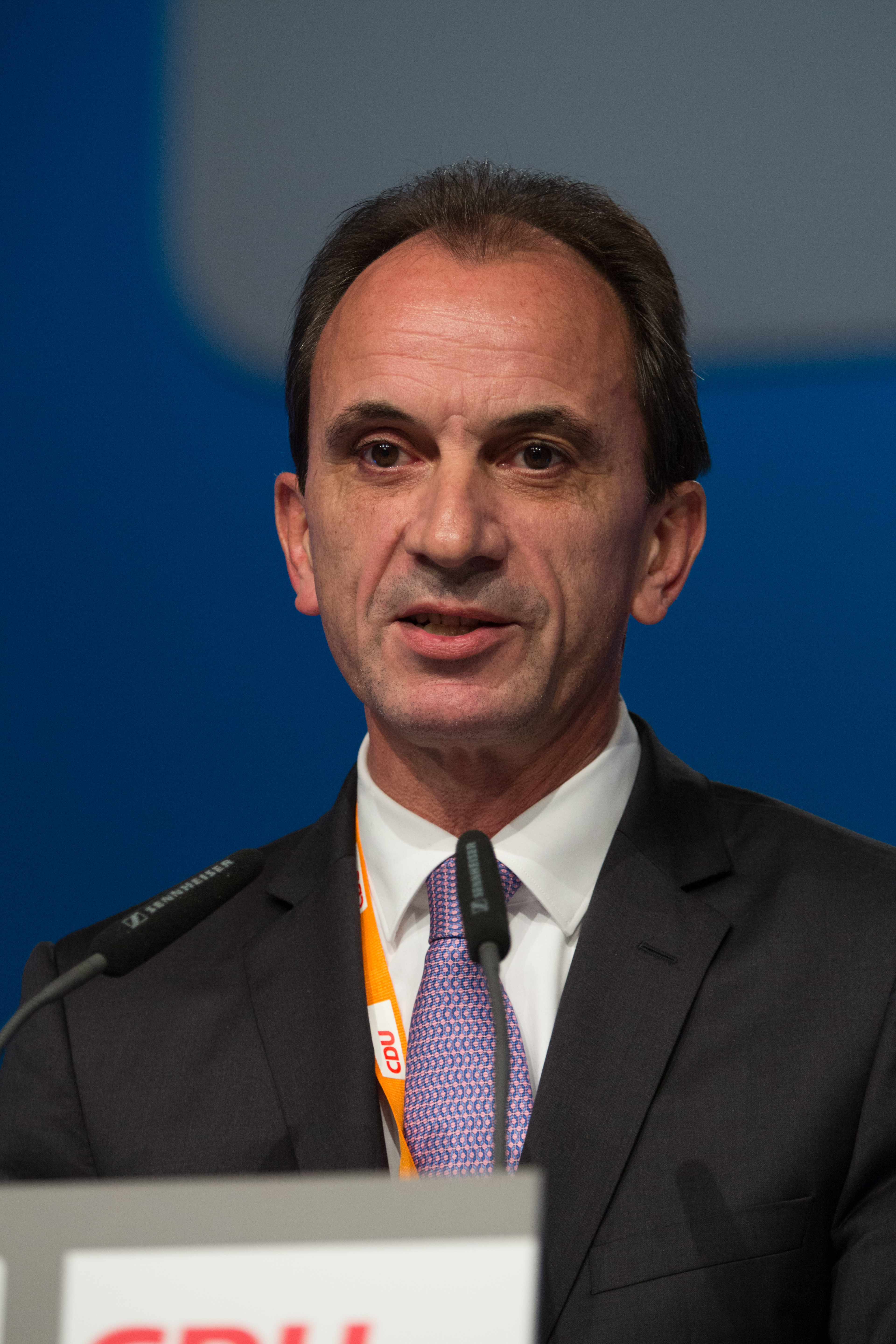 Michael Boddenberg, Vorsitzender der CDU-Landtagsfraktion Hessen und Mitglied des CDU Bundesvorstandes auf dem 29. Parteitag der CDU Deutschlands am 6. Dezember 2016 in Essen, Grugahalle